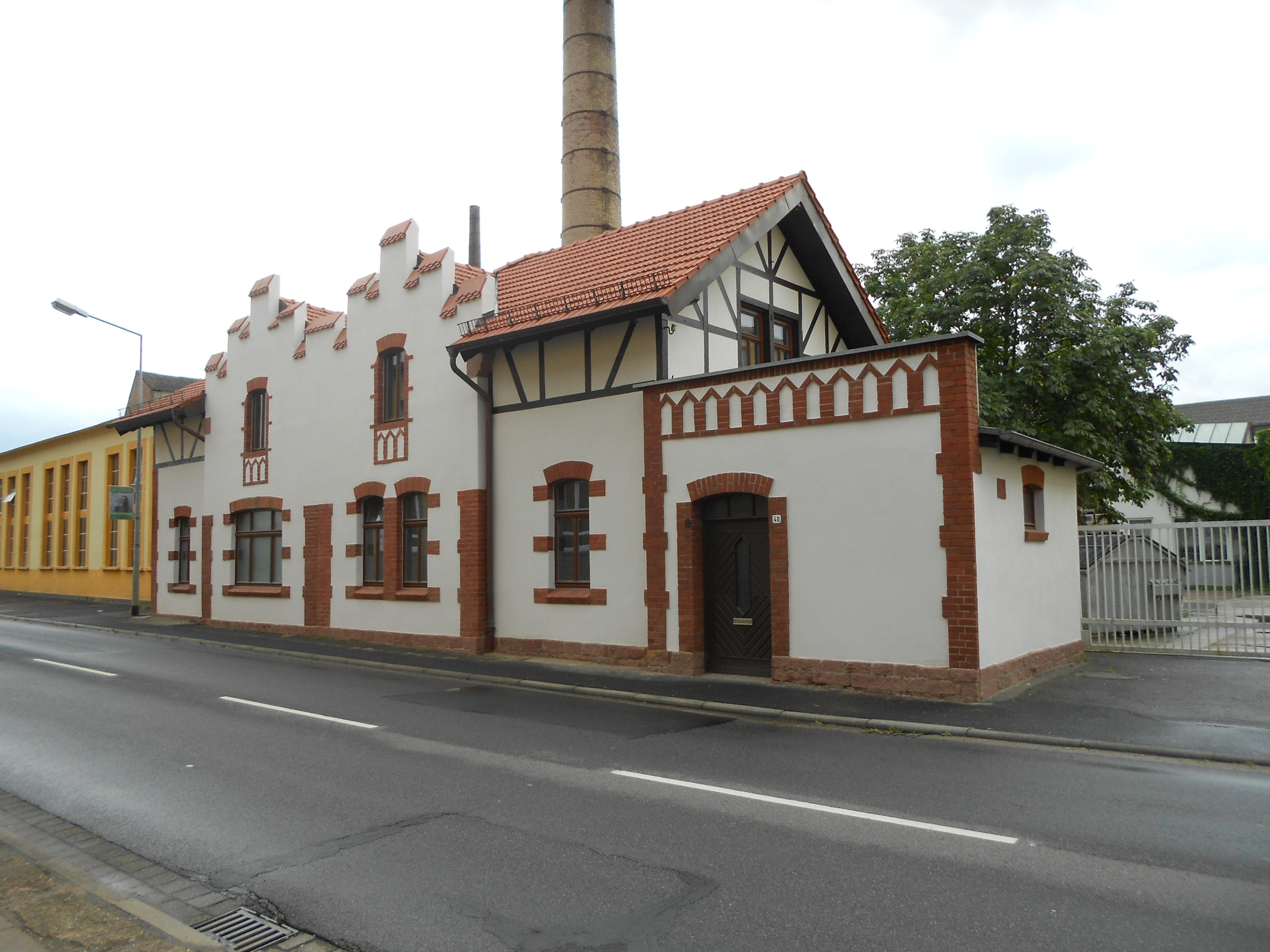 Pförtnerhaus der Tonindustrie AG Klingenberg (heute Dekoramik), Trennfurter Straße 40, Akten Nr. D-6-76-134-96